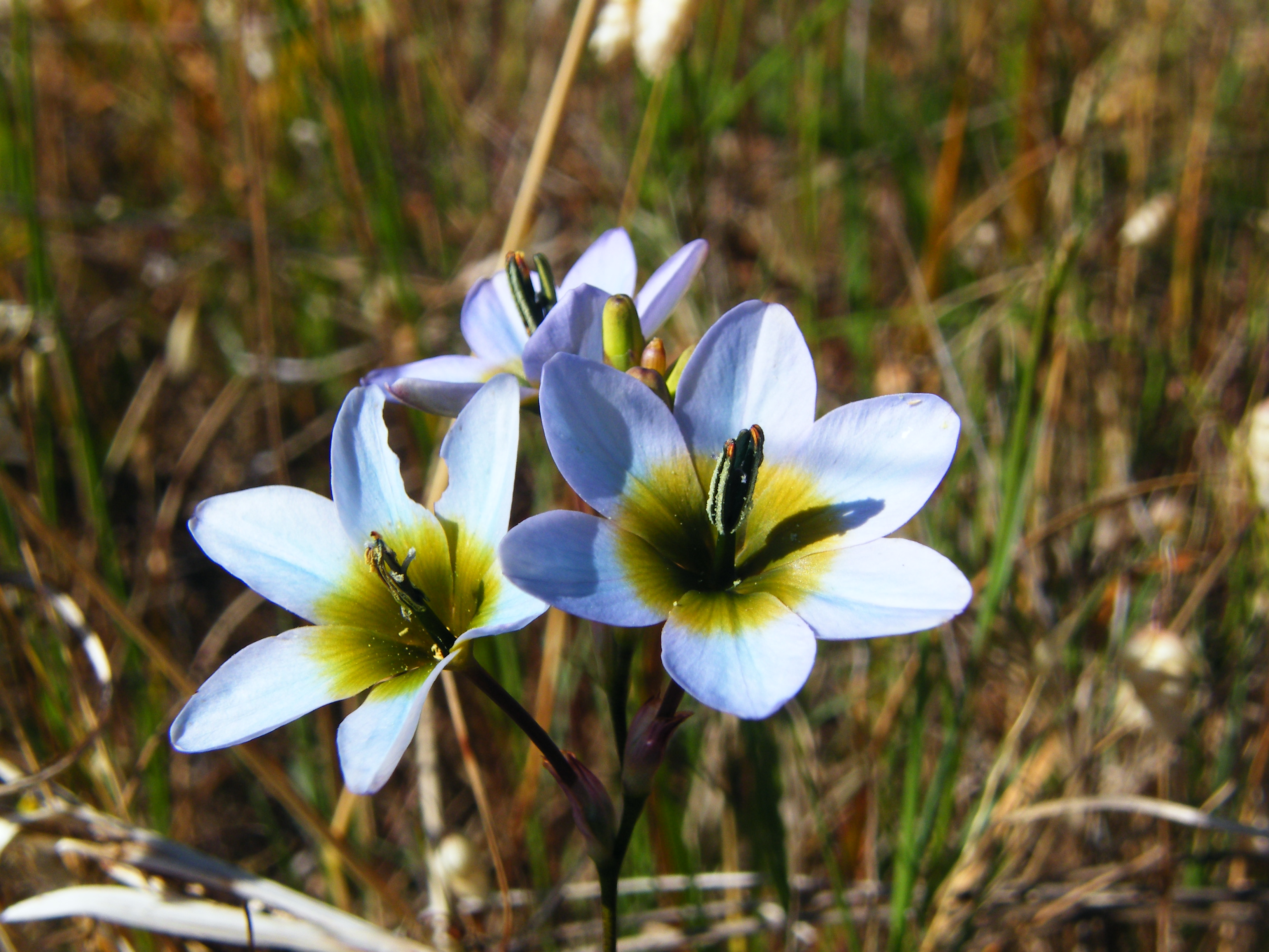 Ixia monadelpha bontkalossie